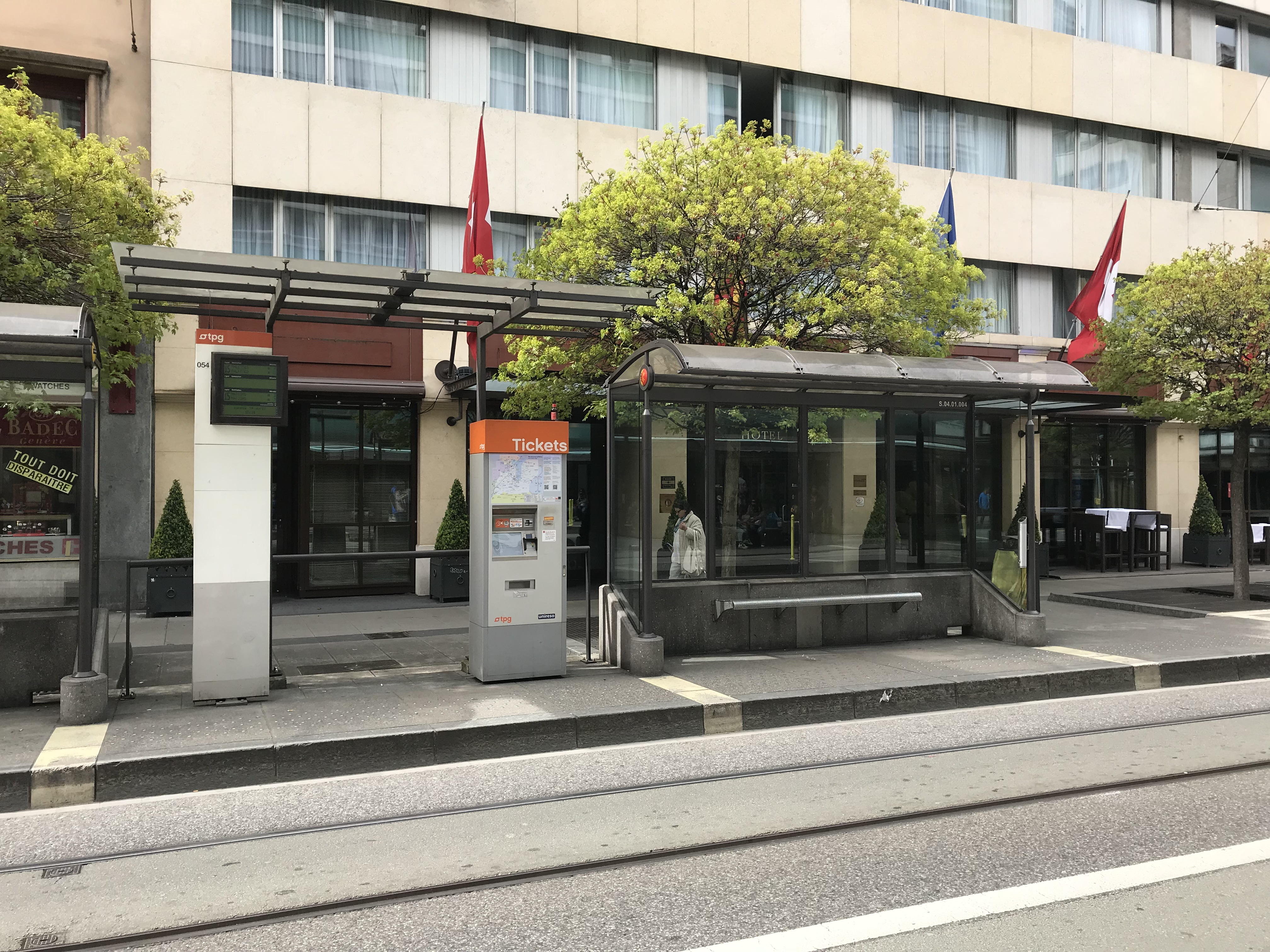 Rue de Lausanne (Genève) .